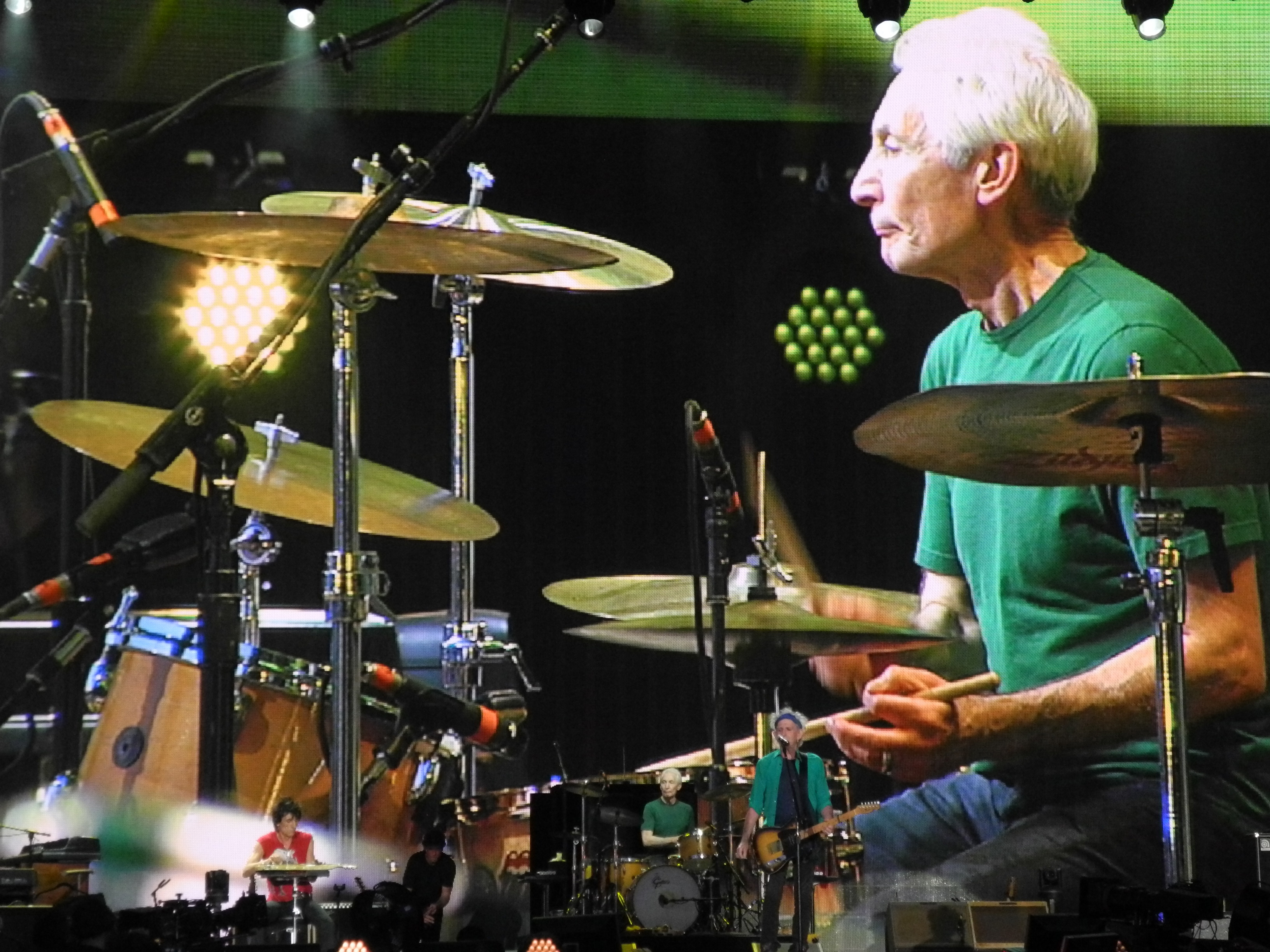 Concerto dei Rolling Stones ad Hyde Park per il tour '50 and counting...' del 2013, Charlie Watts